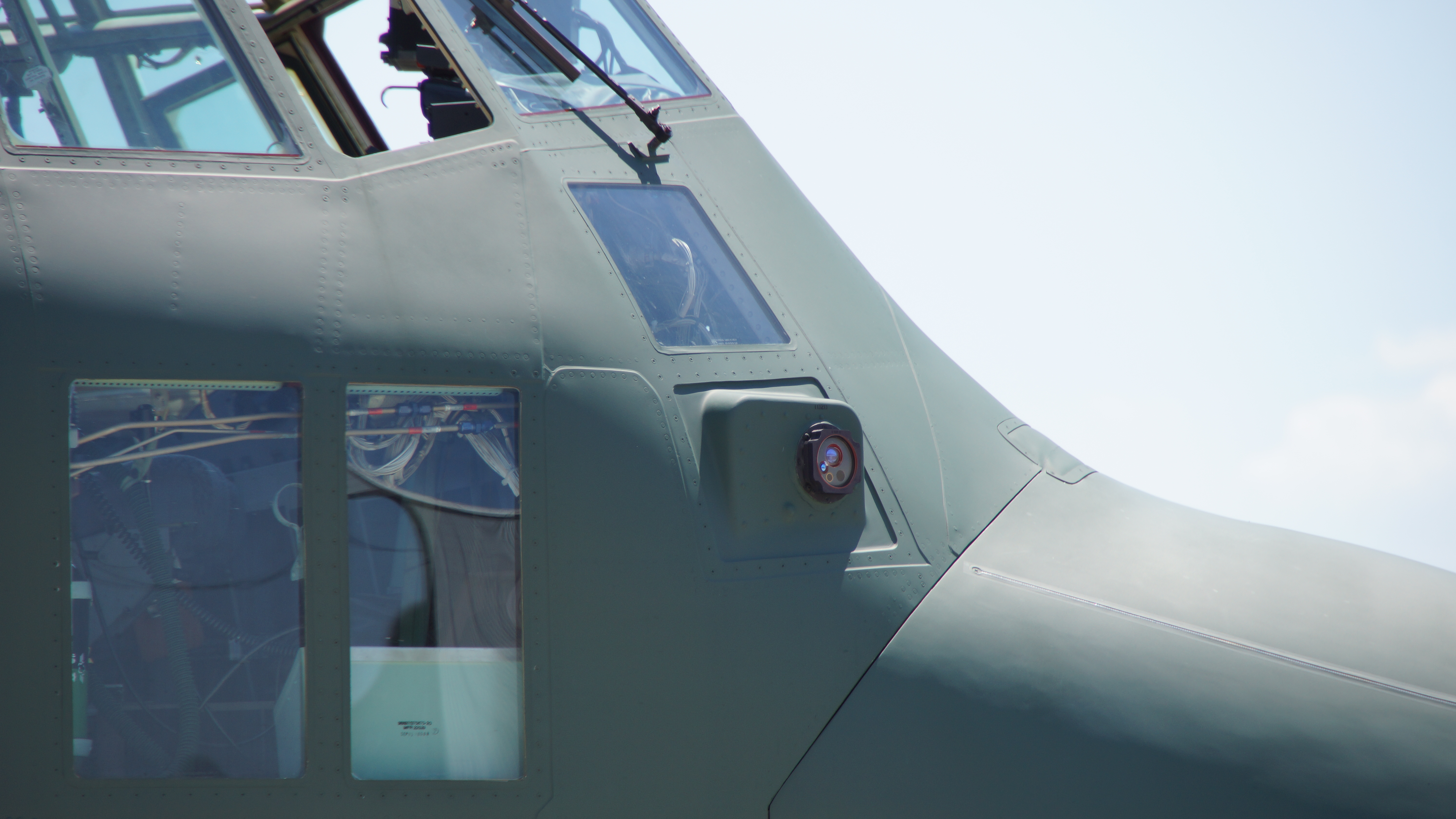 航空自衛隊 C-130H輸送機（05-1085号機） AN/AAR-47ミサイル警報装置（機首右側）。2017年5月28日 美保基地にて。